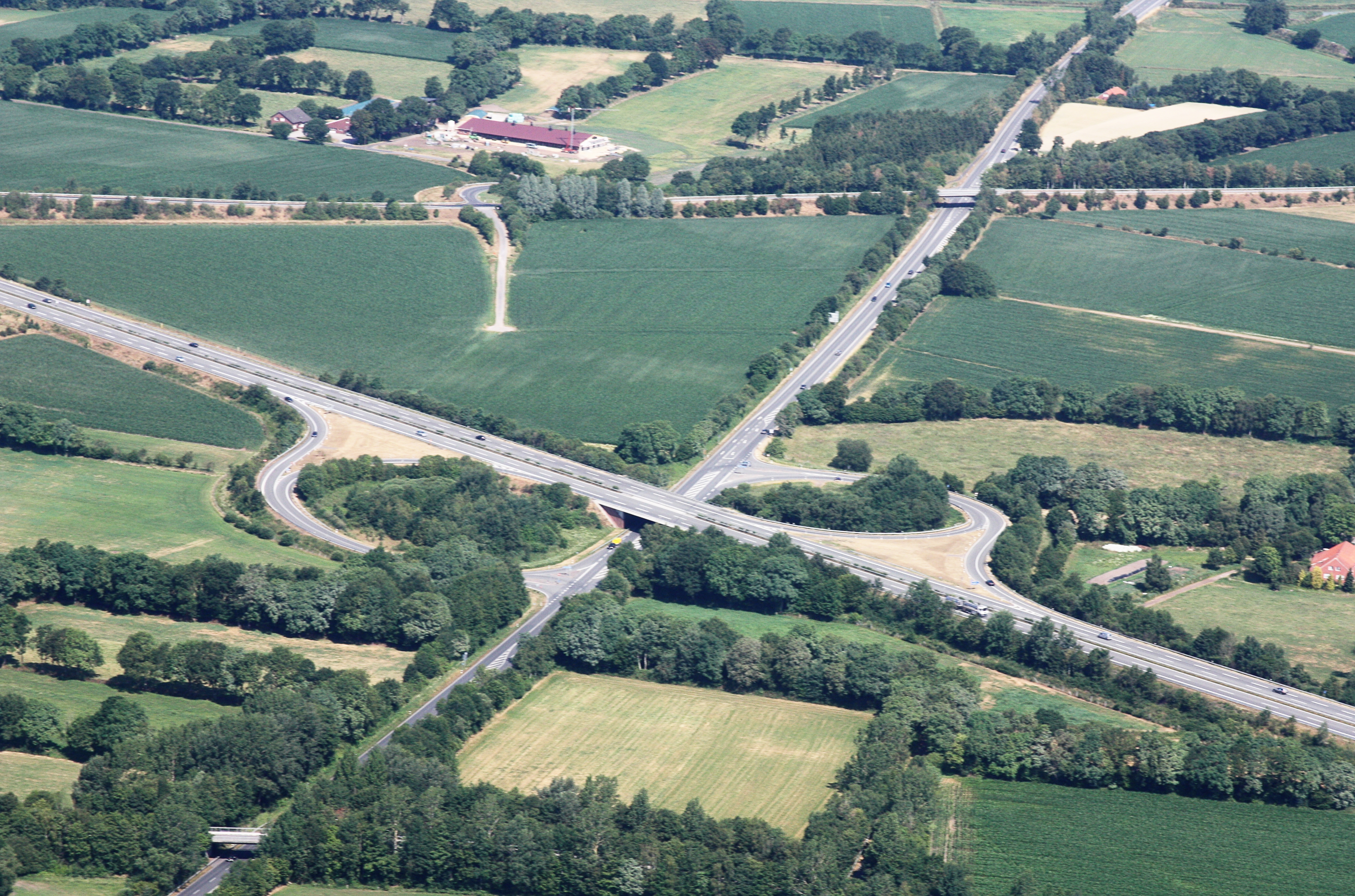 Luftaufnahme; Flug von Westerstede nach Leer; Flughöhe 1500 ft; Juli 2010; Originalfoto bearbeitet: Tonwertkorrektur und Bild geschärft mit Hochpassfilter